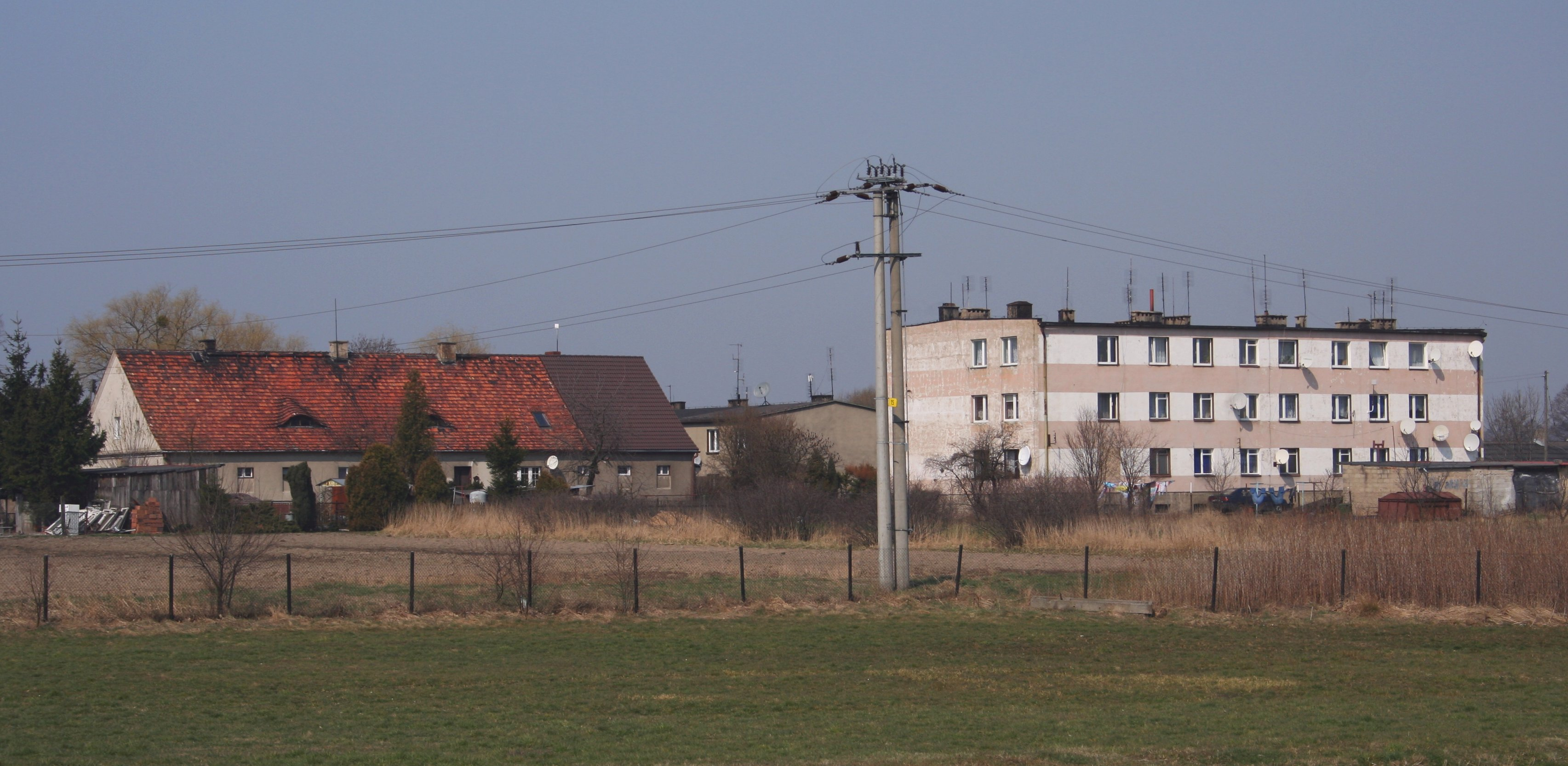 "Dwór - zwyczajowo określana część miejscowości Boronów, powiat lubliniecki, województwo śląskie